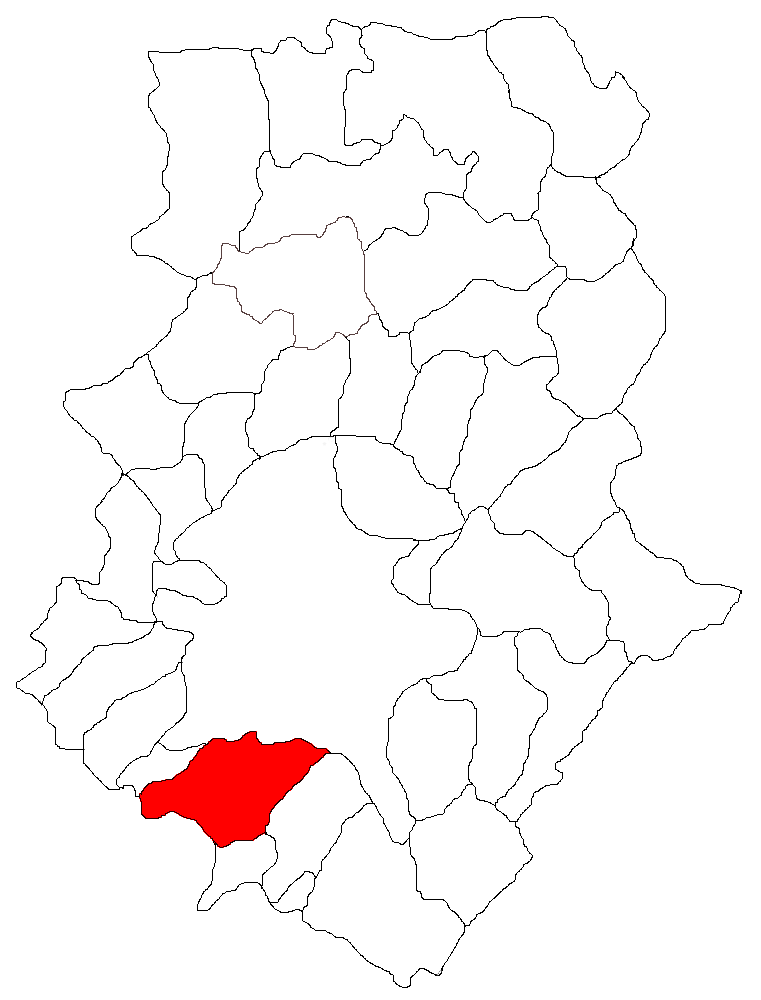 Categorie:Hărţi ale judeţului Ilfov